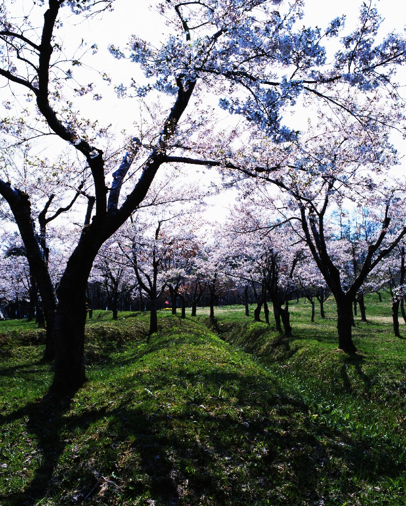 北海道厚沢部町の史跡館城跡の桜。通称「百間堀」と呼ばれる堀に沿って桜が植えられている。